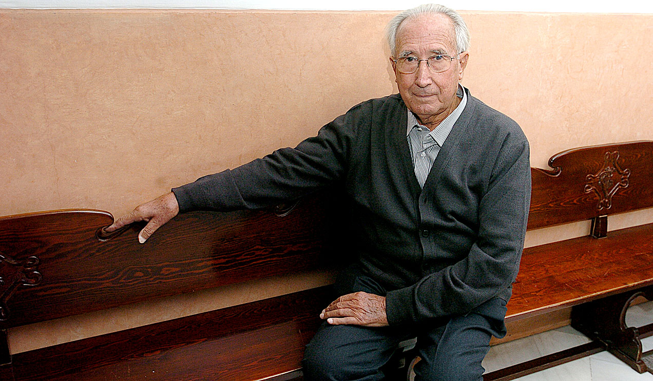 Jordi Mas Castells, missioner de la Garriga al Camerun